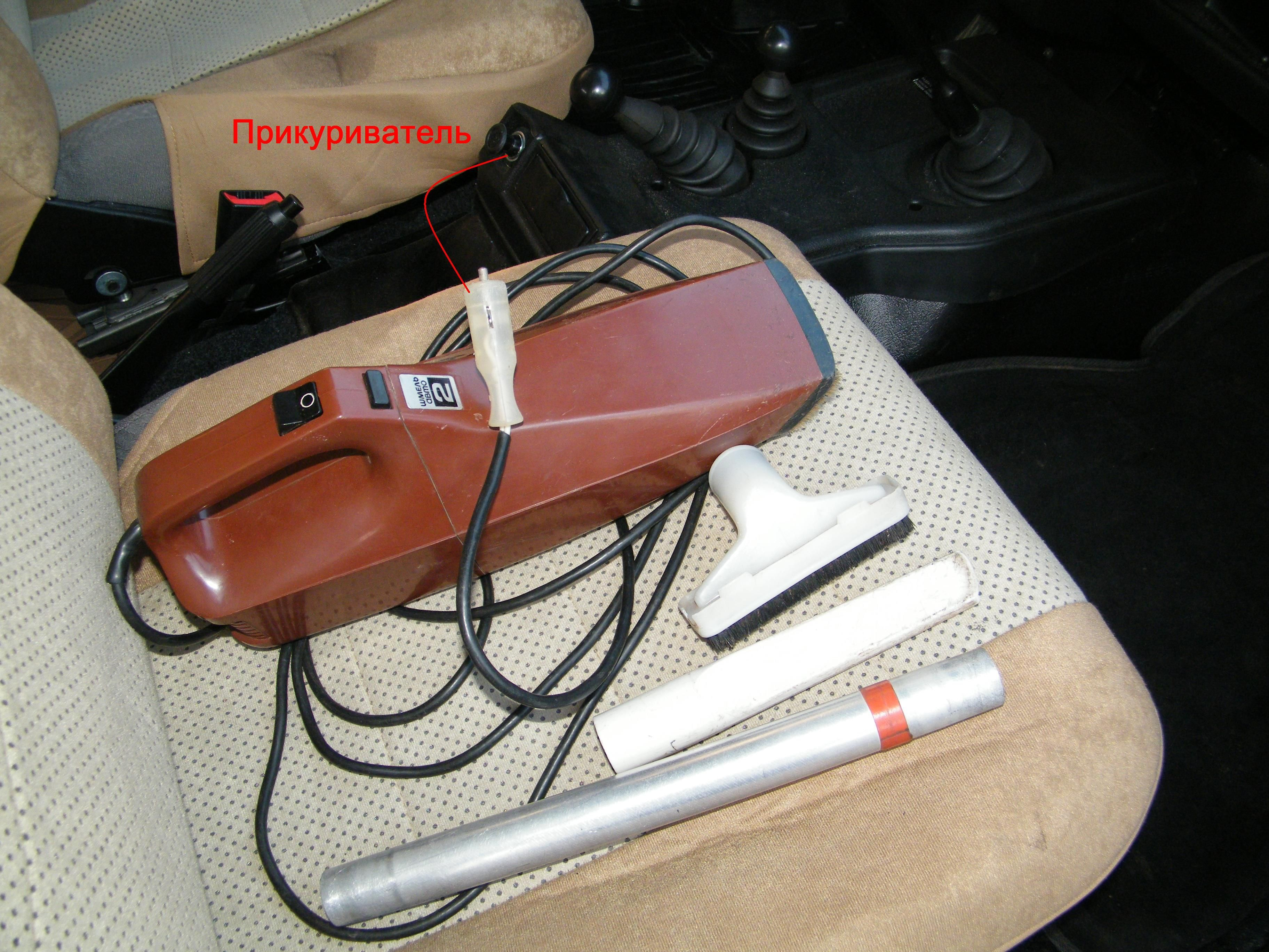 Советский пылесос Шмель-авто